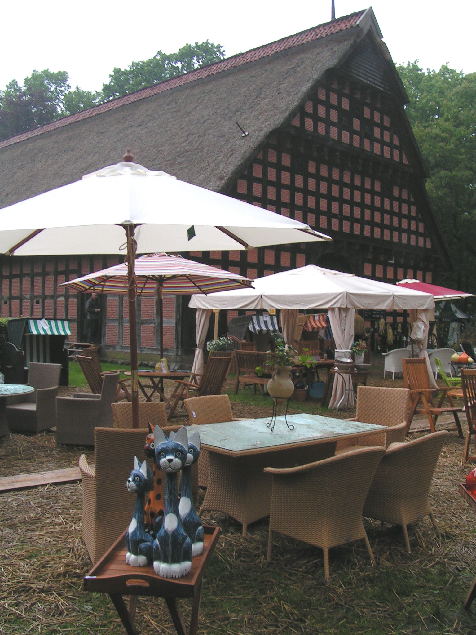 Quatmannshof im Museumsdorf Cloppenburg während der "Gartenpartie" 2006